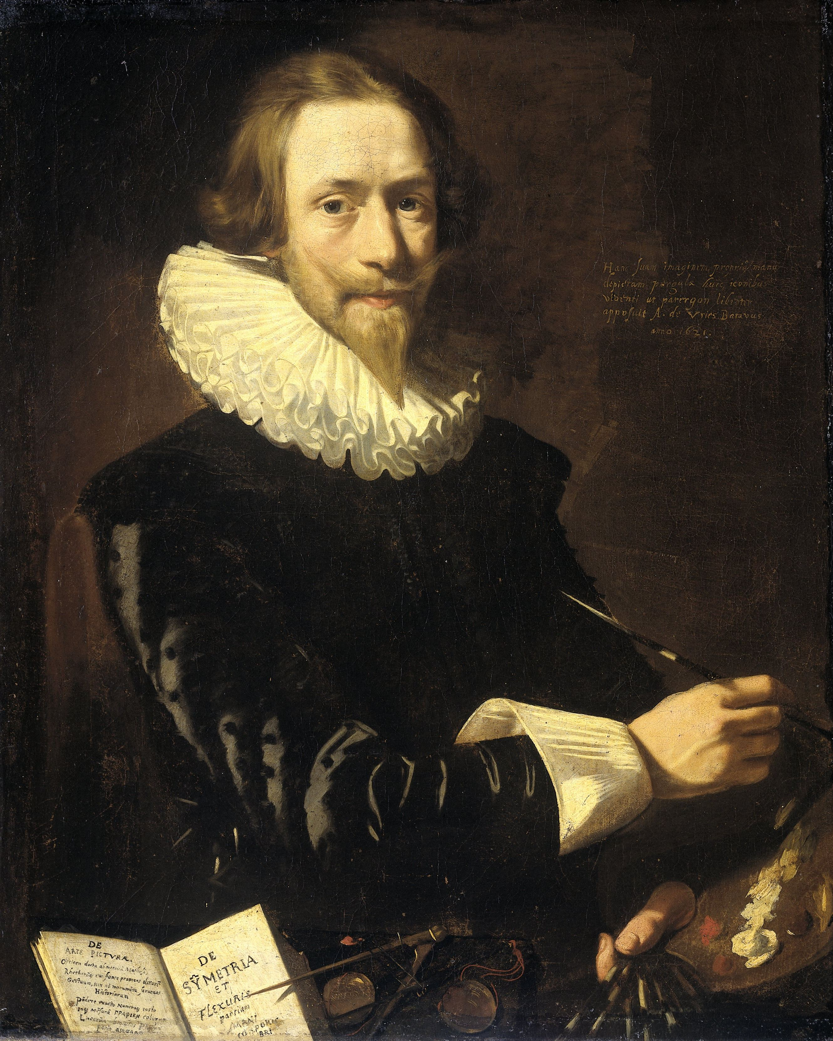 Zelfportret van de schilder Abraham de Vries. Staande, ten halven lijve, penseel in de linkerhand, palet en penselen in de rechterhand. Onderaan een tafel waarop een opengeslagen boek over de schilderkunst ligt, een passer en enkele andere voorwerpen.